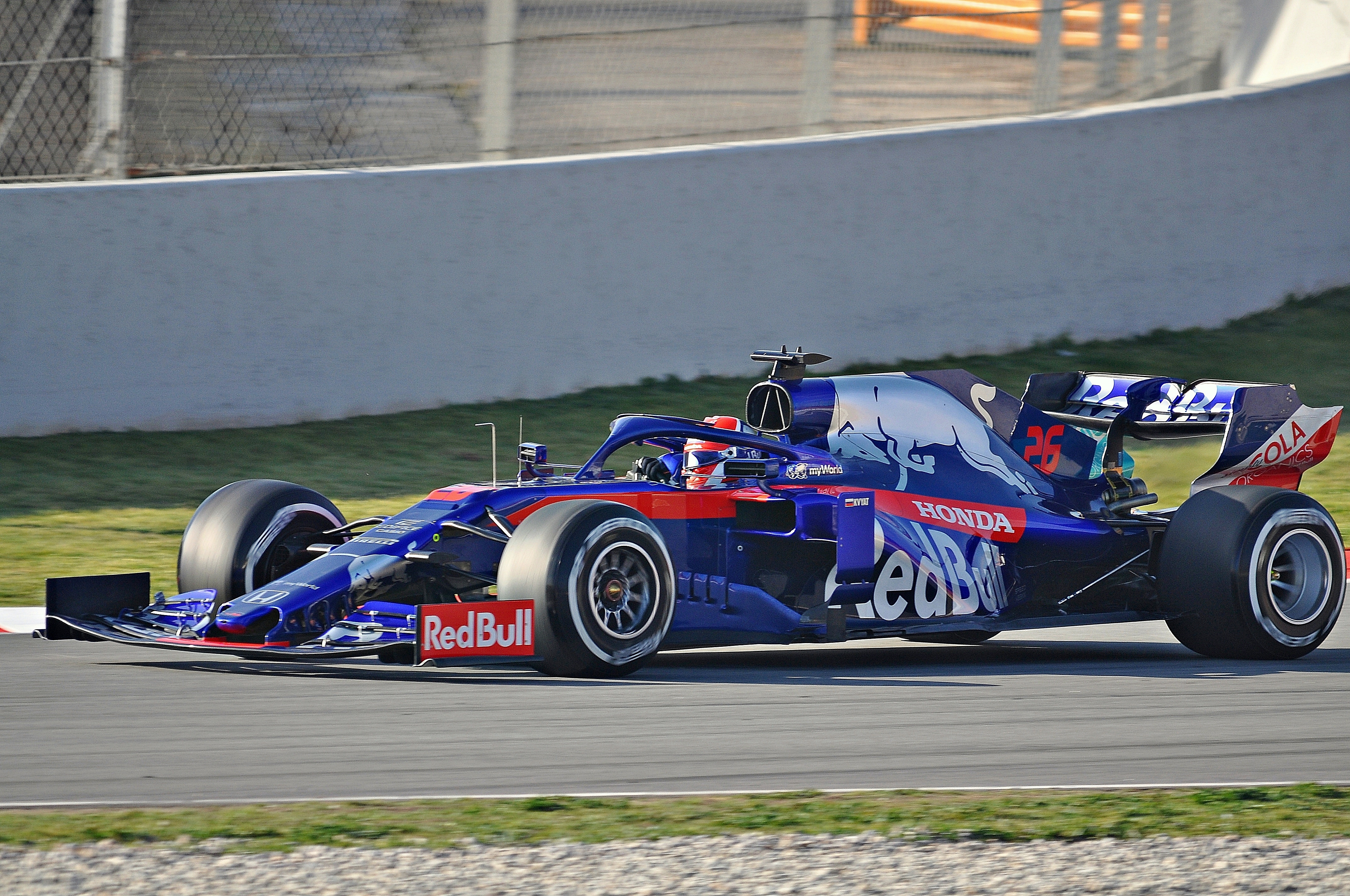 Test Days-Circuito de Catalunya